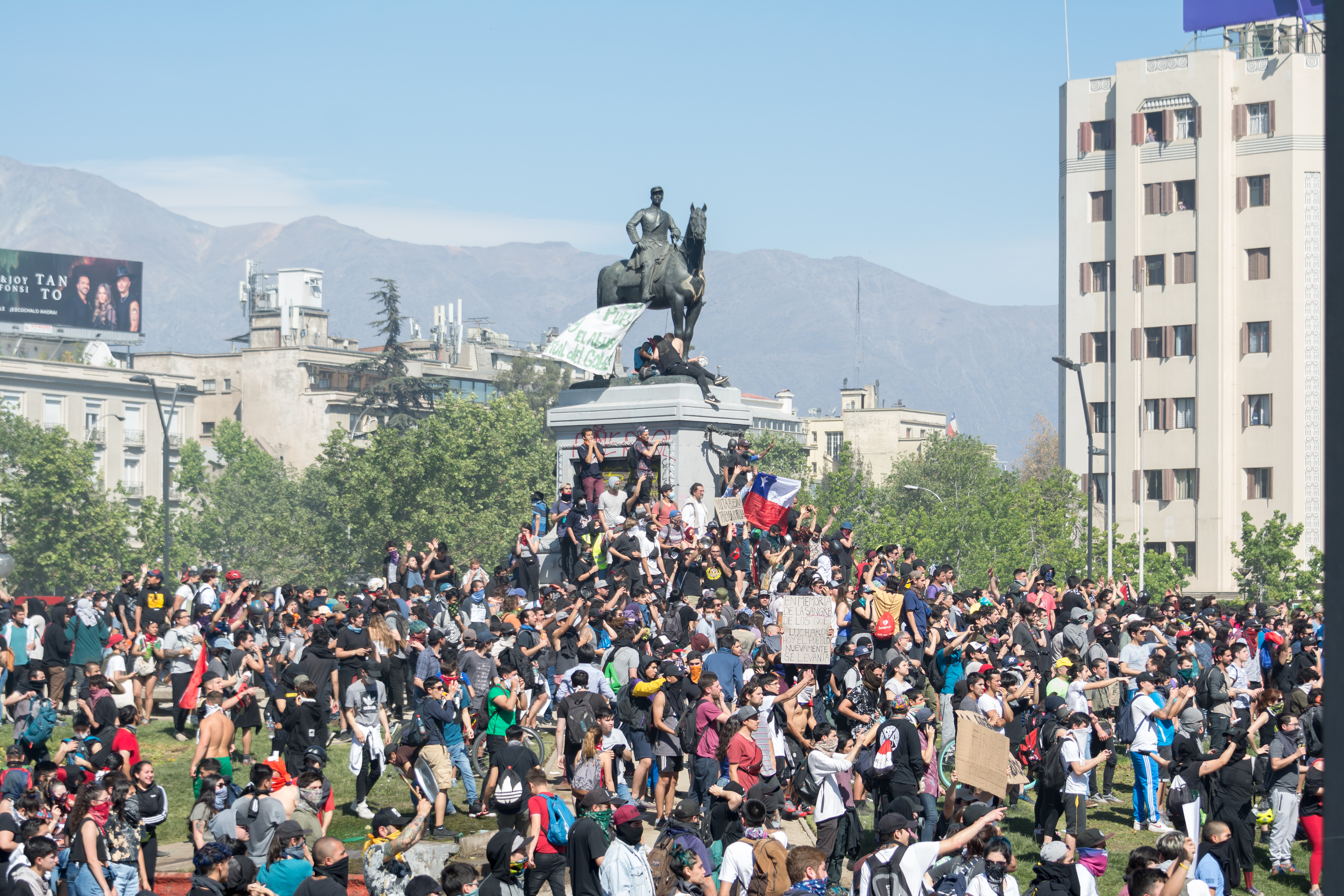 Protestas en Chile de 2019, Santiago, Chile